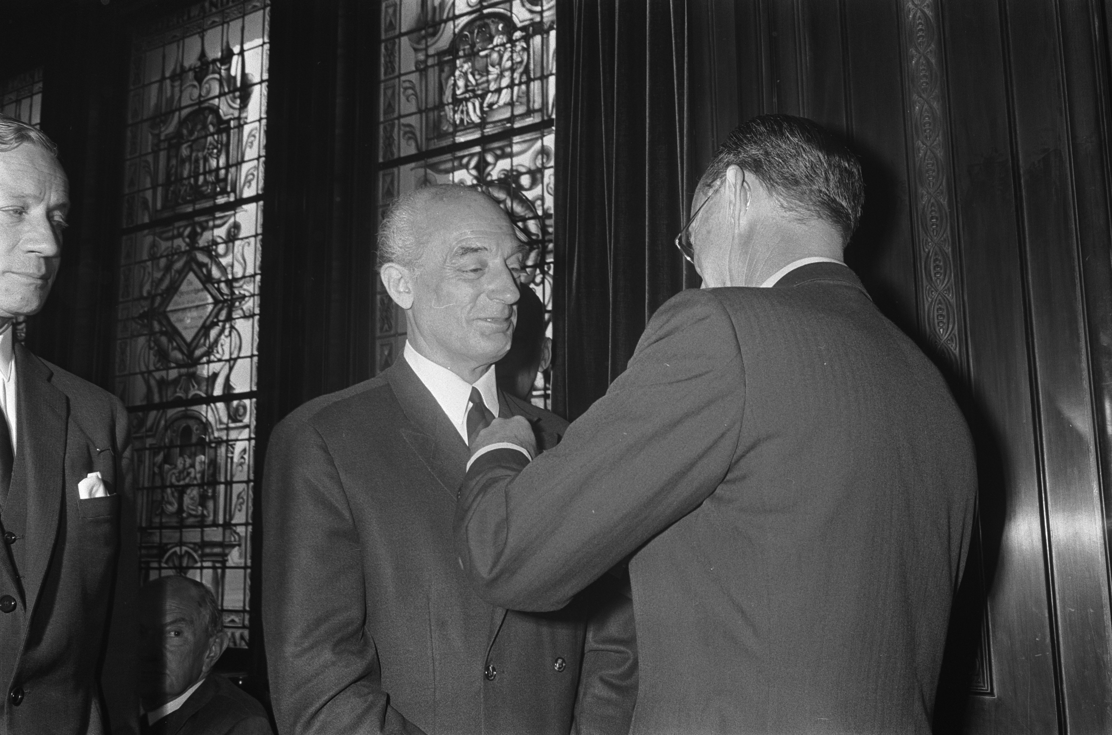 Collectie / Archief : Fotocollectie Anefo Reportage / Serie : Uitreiking Zilveren Anjers door prins Bernhard Beschrijving : Dhr. Leonhardt, G.J.G. en prins Bernhard Datum : 27 juni 1967 Trefwoorden : culturele prijzen, huldigingen, onderscheidingen, prinsen, vrijwilligers Persoonsnaam : (1911-2004), Bernhard (prins Nederland), Leonhardt, G.J.G. Instellingsnaam : Zilveren Anjer Fotograaf : Fotograaf Onbekend / Anefo Auteursrechthebbende : Nationaal Archief Materiaalsoort : Negatief (zwart/wit) Nummer archiefinventaris : bekijk toegang 2.24.01.05 Bestanddeelnummer : 920-4427 Reacties Geplaatst door Maaike op 06 november 2012 - 18:46. Instellingsnamen: Prins Bernhard-fonds (thans Prins Bernhard Cultuurfonds) locatie: Algemene Bank Nederland (ABN) plaats: Amsterdam